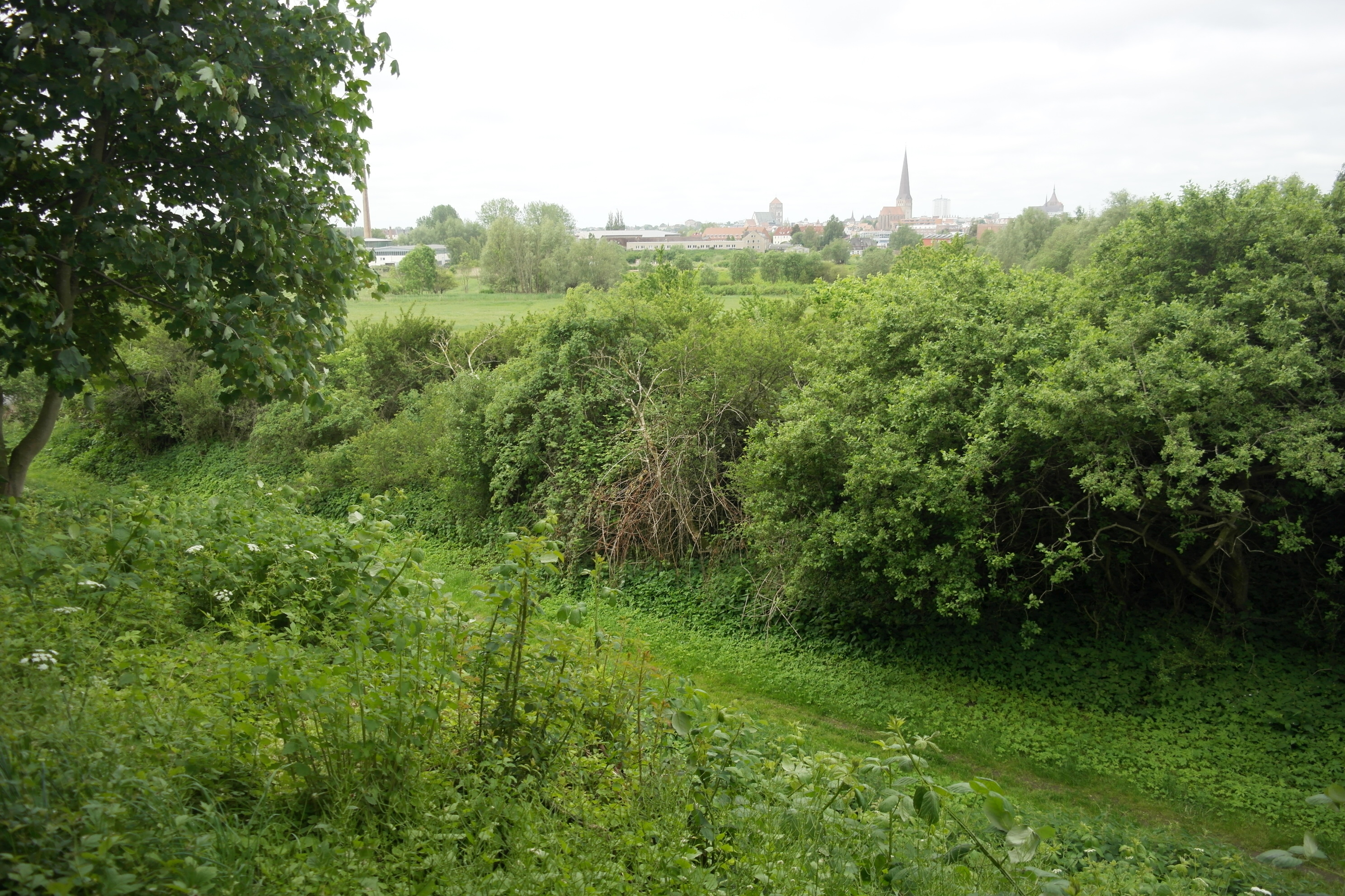 Trasseneinschnitt in Rostock-Dierkow für die in den 1930er Jahren gebaute und nie fertiggestellte Bahnstrecke von Rostock nach Markgrafenheide